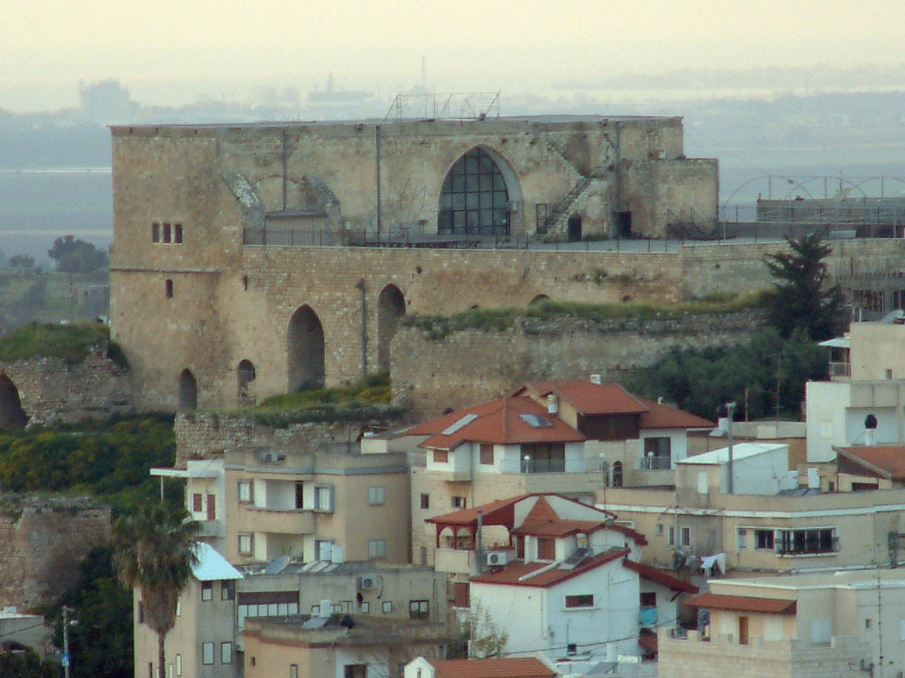 מבצר שפרעם